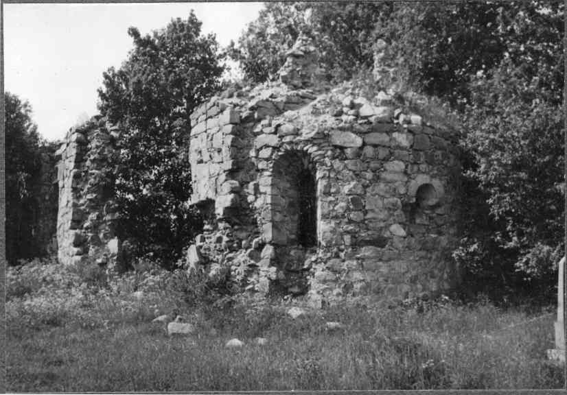 Hjälmseryds g:a kyrka. foto: bengt lundberg.